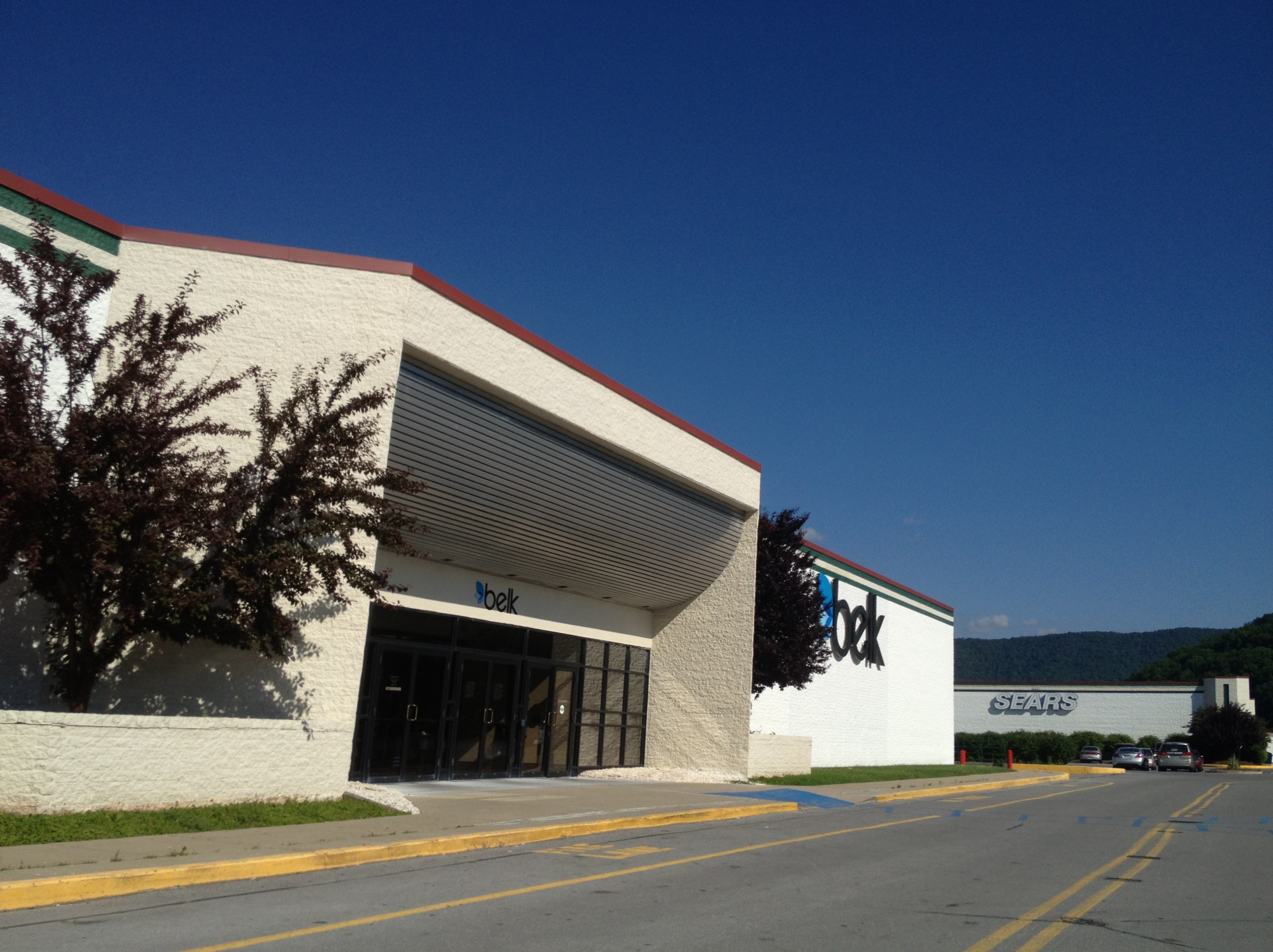 Belk - Mercer Mall